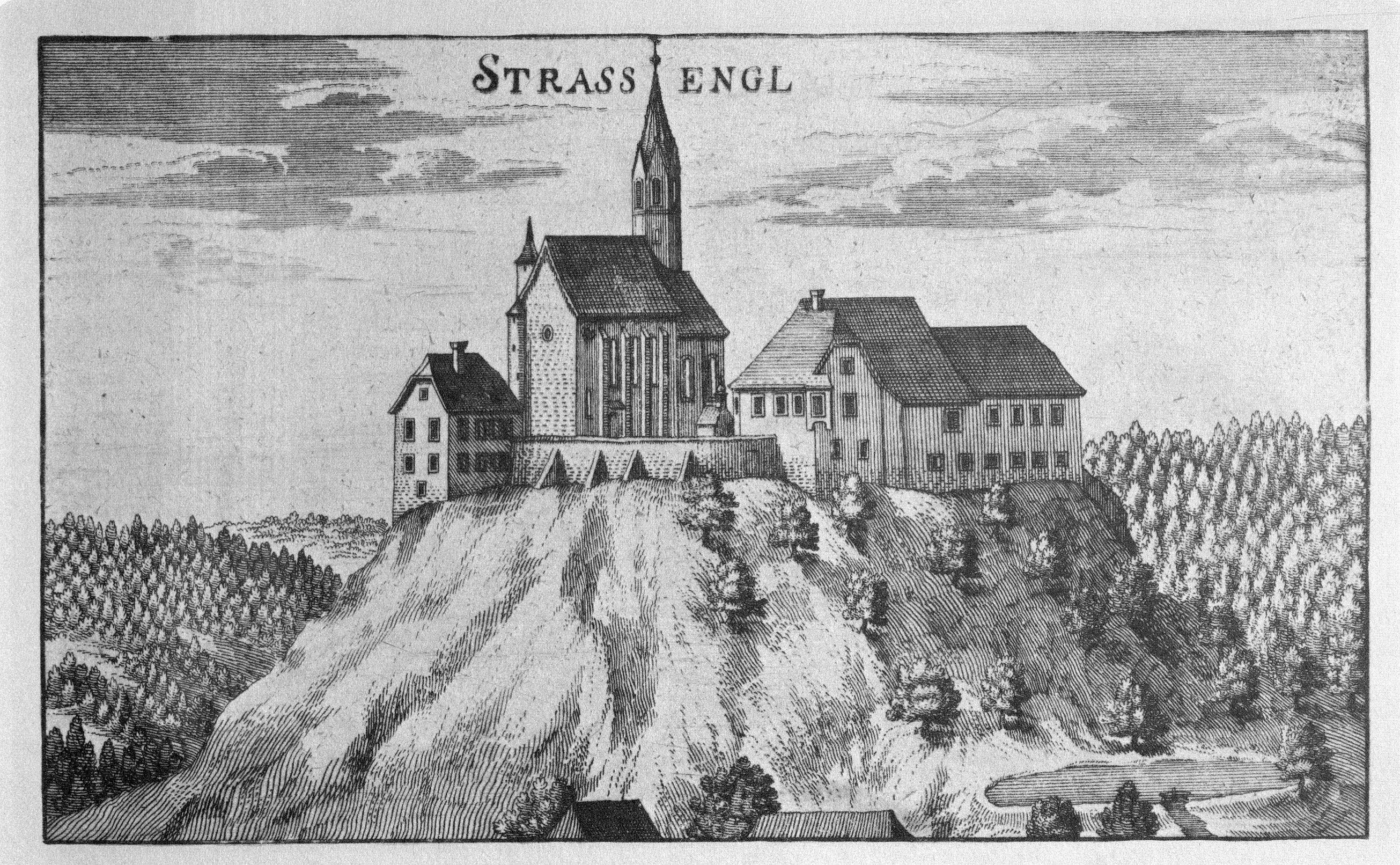 G. M. Vischers Käyserlichen Geographi, Topographia Ducatus Stiriae, Das ist: Eigentliche Delineation / und Abbildung aller Städte / Schlösser / Marcktfleck / Lustgärten / Probsteyen / Stiffter / Clöster und Kirchen / so es sich im Herzogthumb Steyrmarck befinden; Und anjetzo Umb einen billichen Preyß zu finden seynd Bey Johann Bitsch Universitäts Buchhandlern / Auff dem Juden=Platz bey der guldenen Saulen. Graz 1681 Die Nummerierung der Dateien folgt der alphabetischen Reihung der Ortsnamen und entspricht nicht dem Vischer-Register